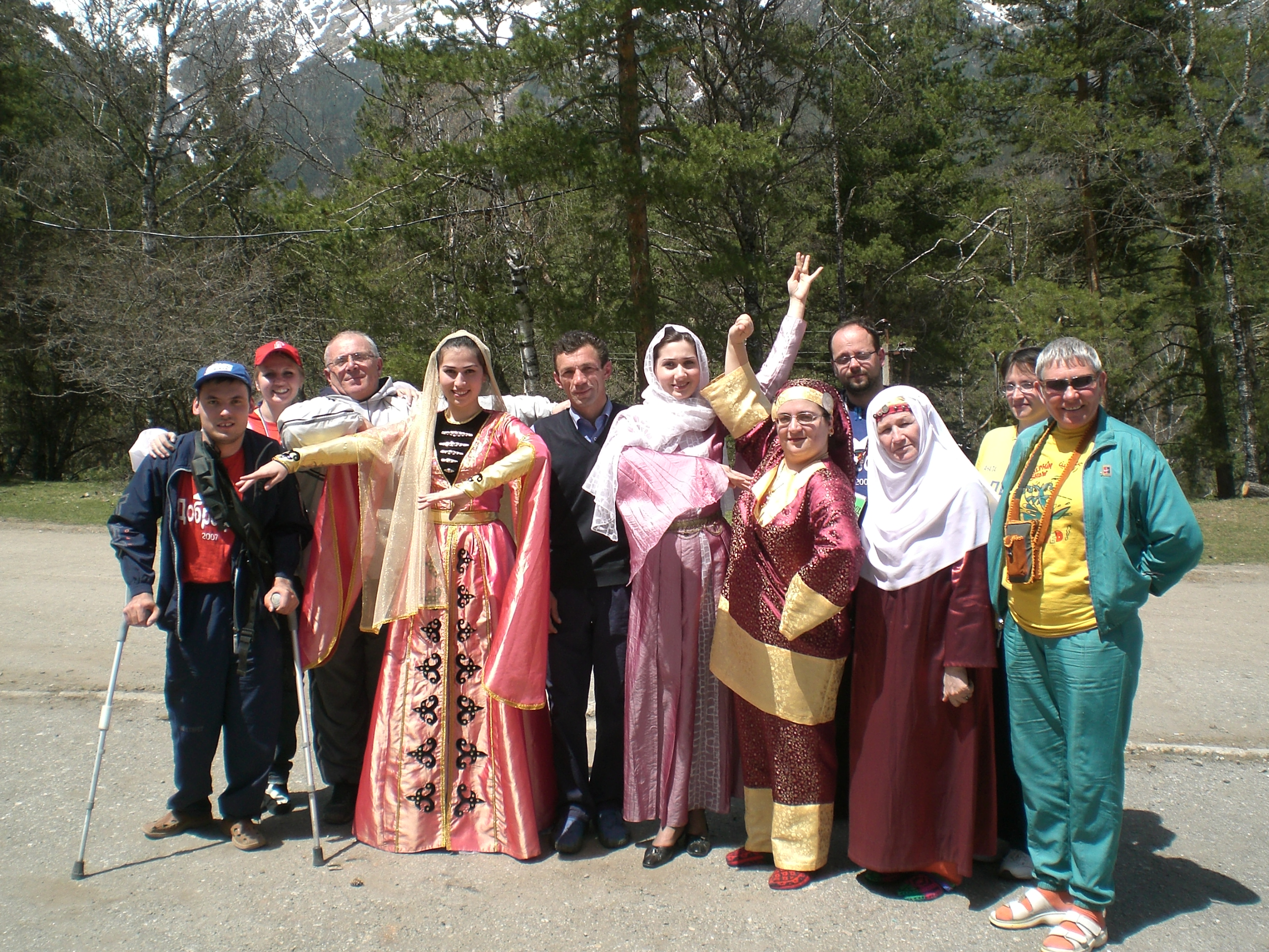 Слет добровольцев Юга России (Карачаево-Черкессия, май, 2007